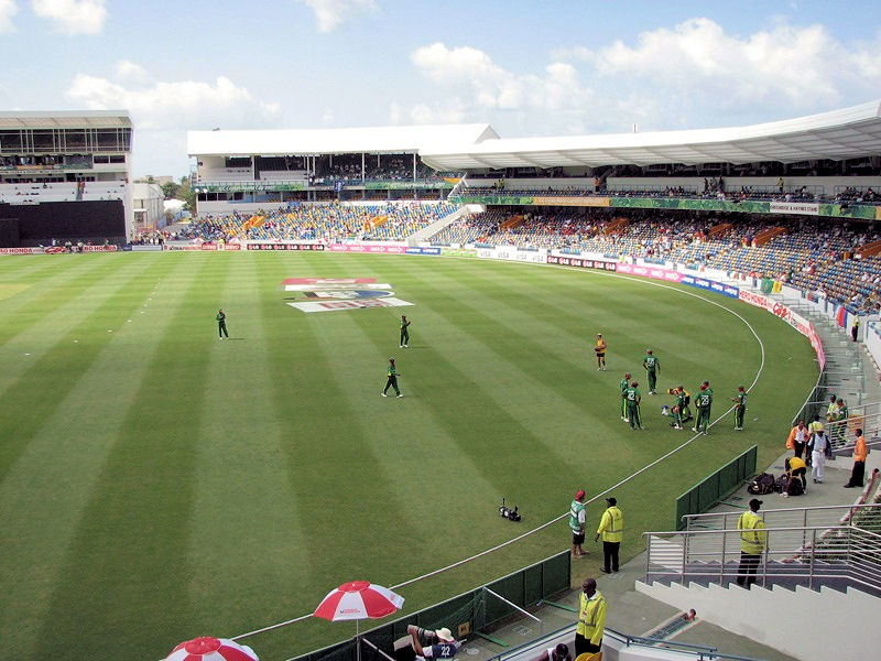 Kensington Oval stands